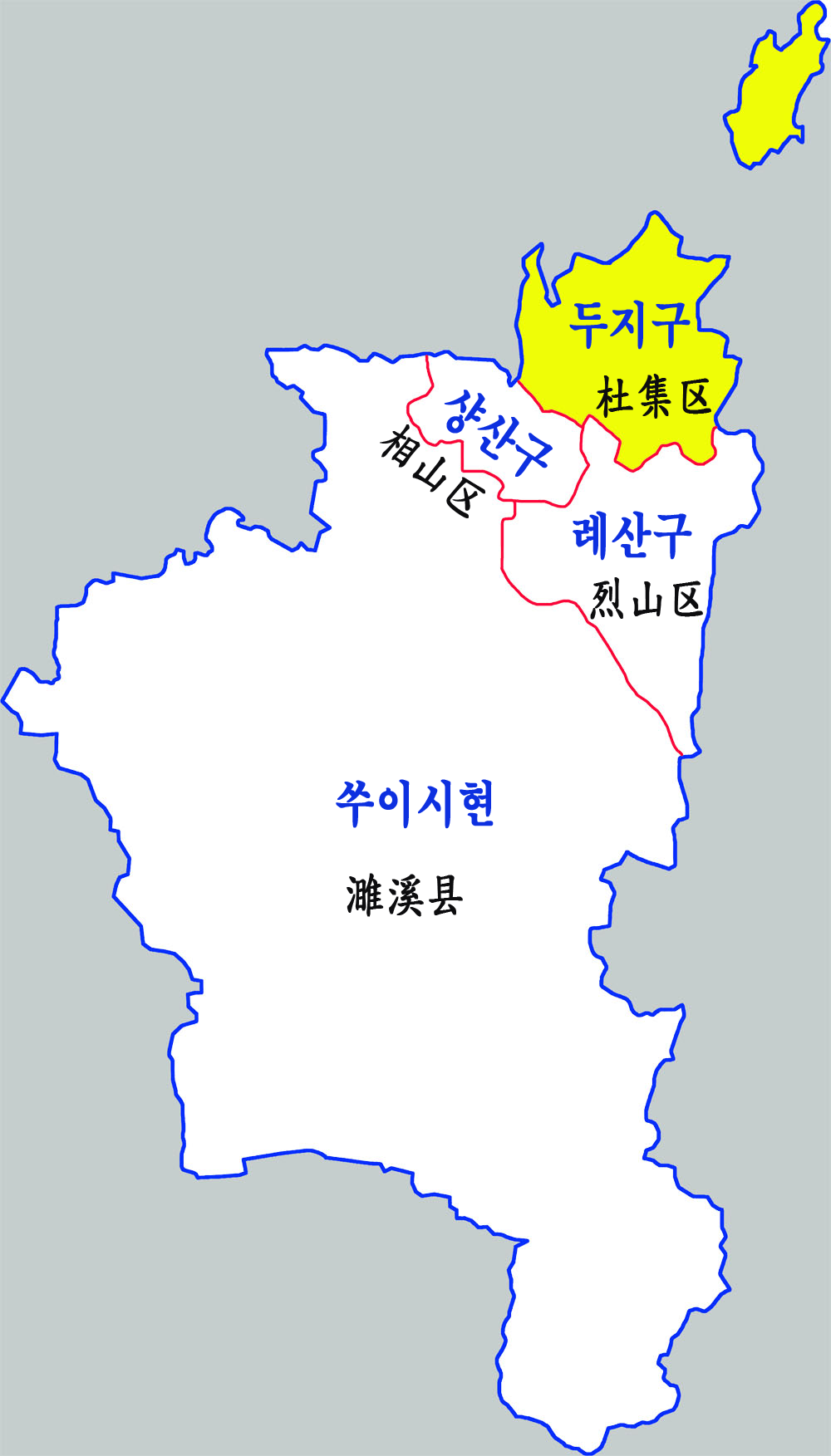 화이베이시 행정구역